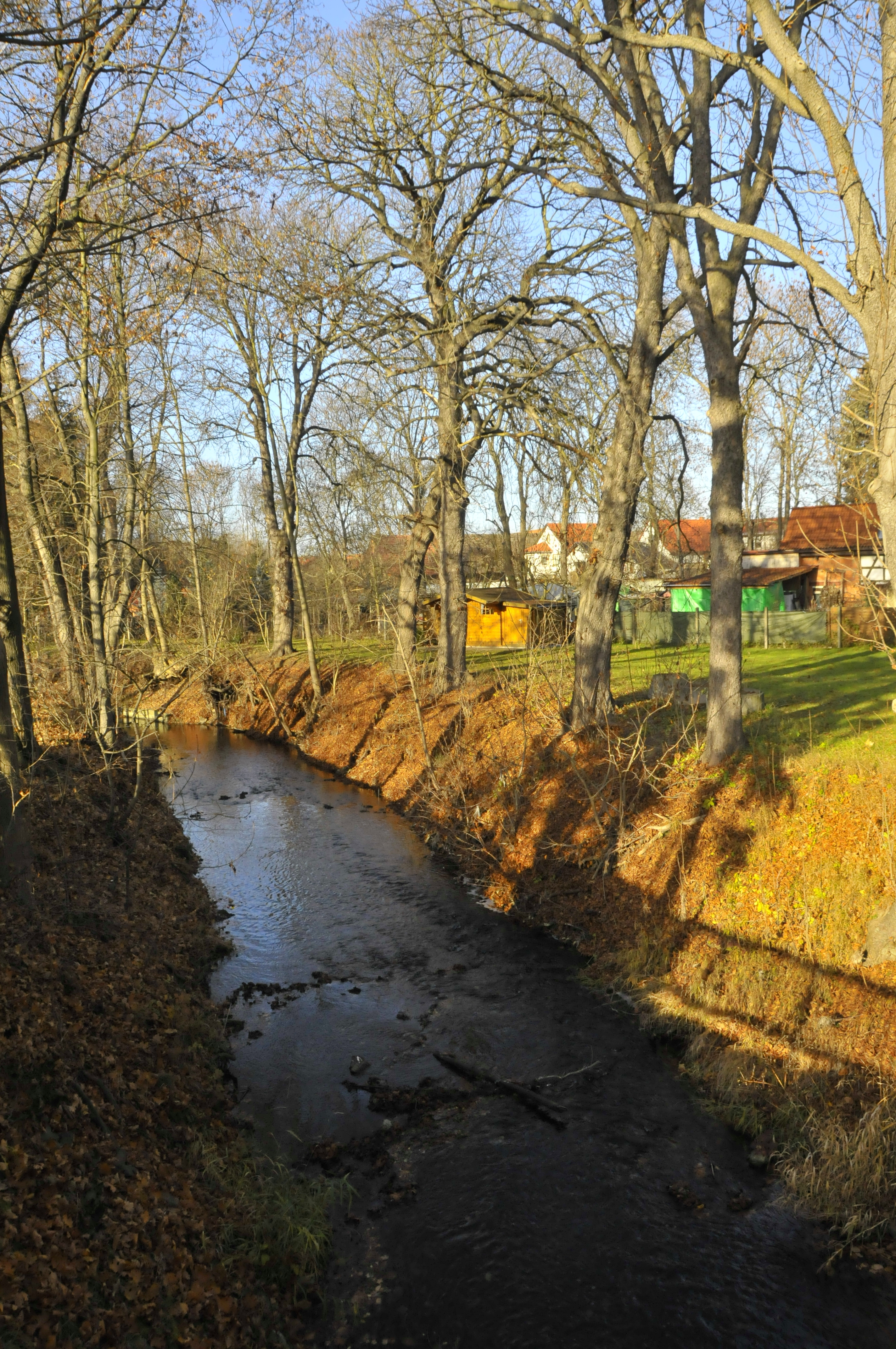 Eischleben, Wipfra